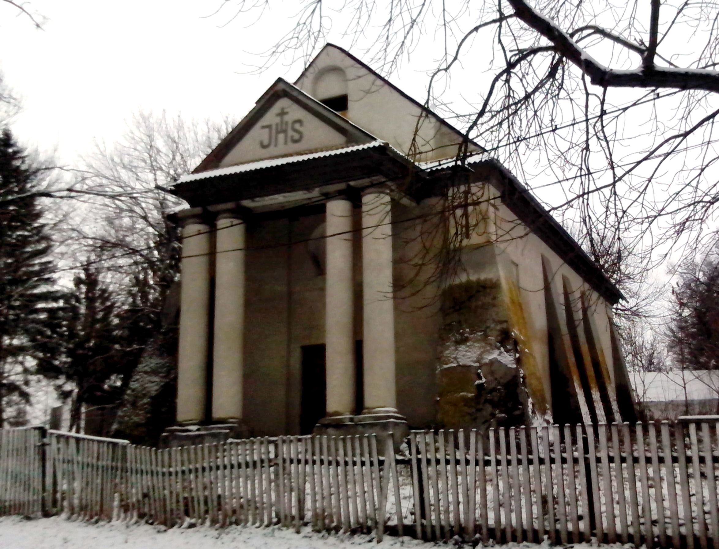 Костел святої Трійці у с. Новосілка Деражнянського району. 1797 рік